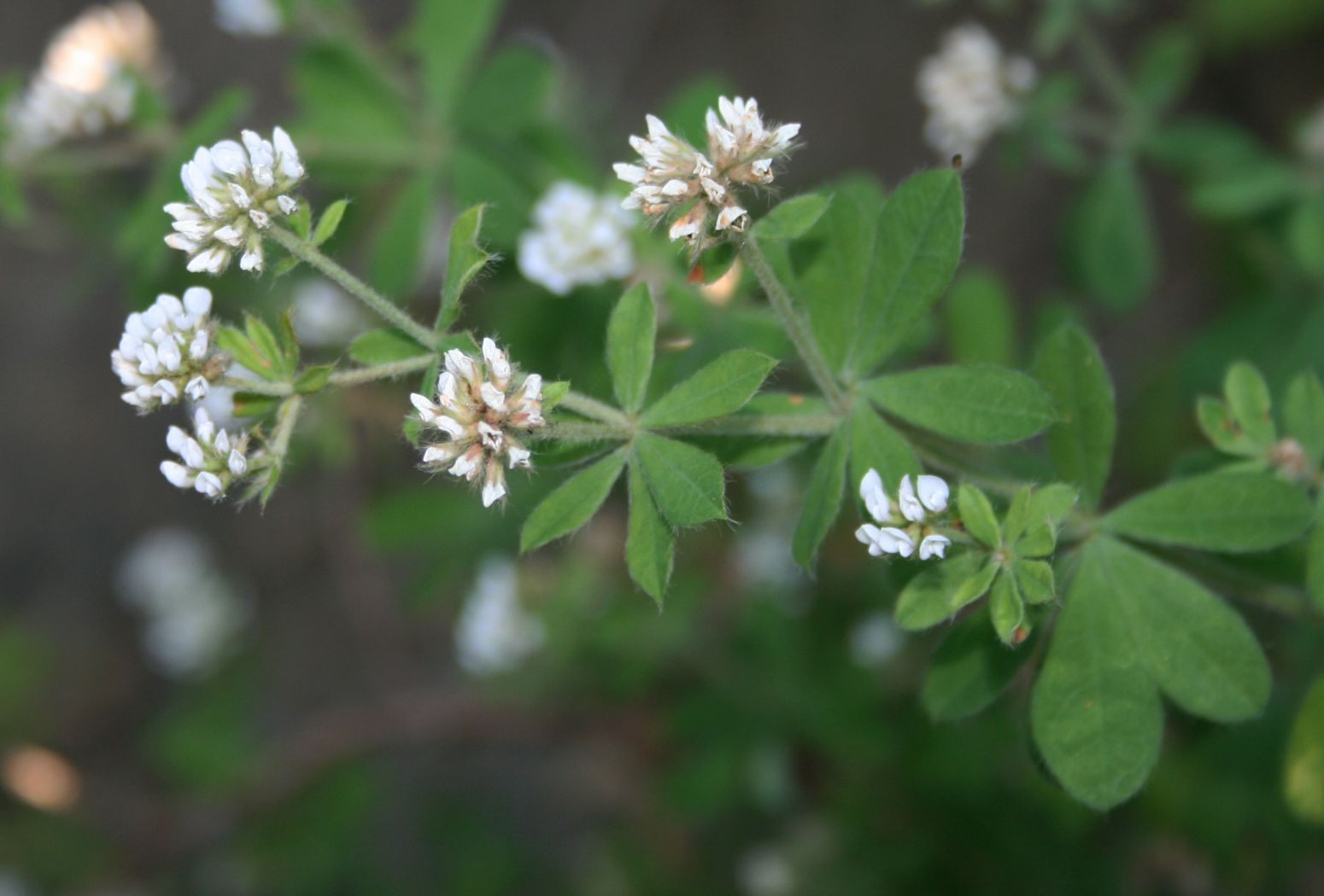 Dorycnium graecum, Hülsenfrüchtler (Fabaceae), Faboideae - Türkei/Türkiye/Turkey: Düzce Prov./Düzce ili, NW Kalkın W Akçakoca, Eichen-Mischwald